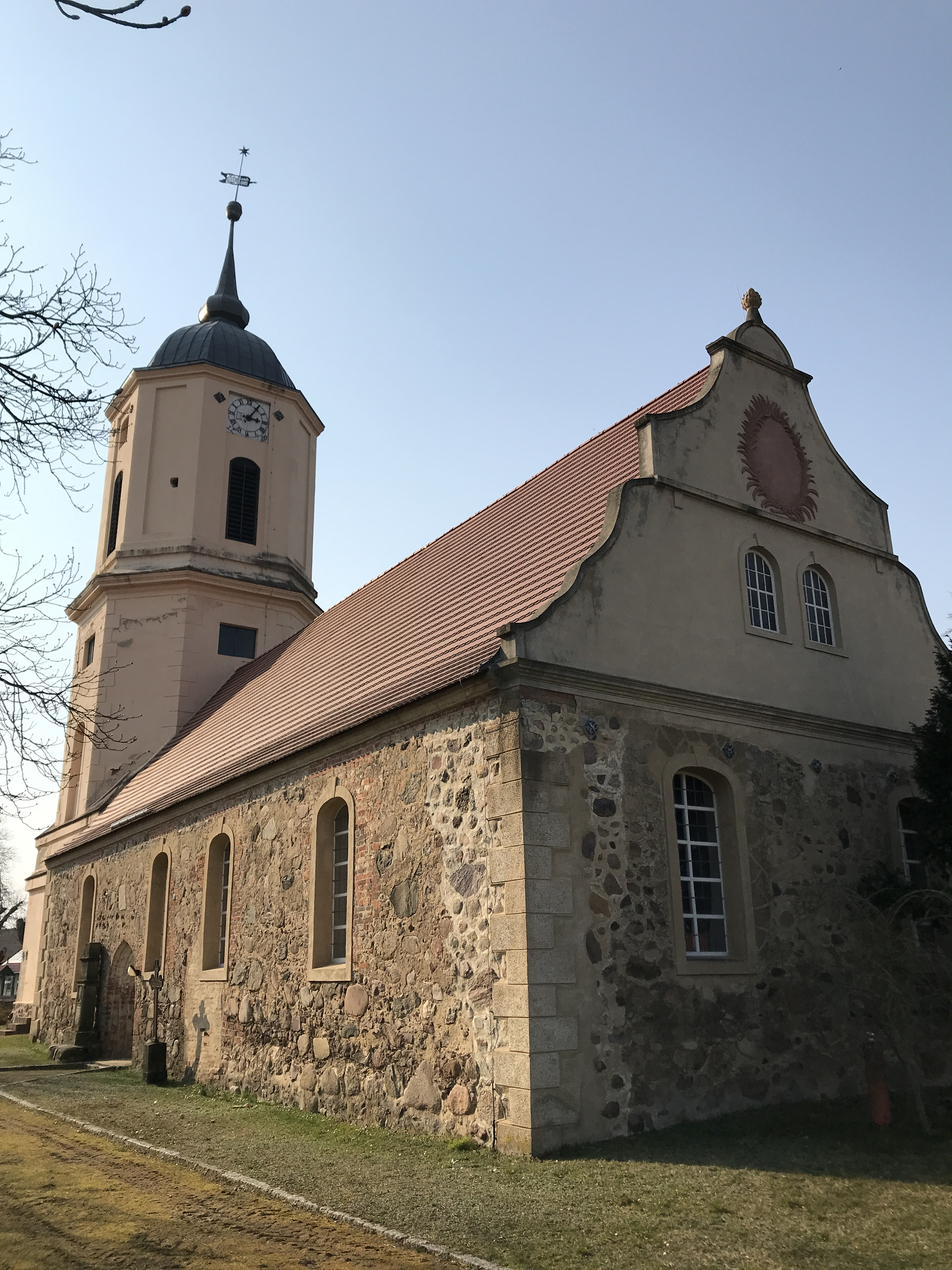 Die Dorfkirche Zützen ist eine Feldsteinkirche in Zützen, einem Ortsteil der Stadt Golßen im Landkreis Dahme-Spreewald im Land Brandenburg. Im Innern steht unter anderem ein frühbarocker Altaraufsatz aus dem Jahr 1710.